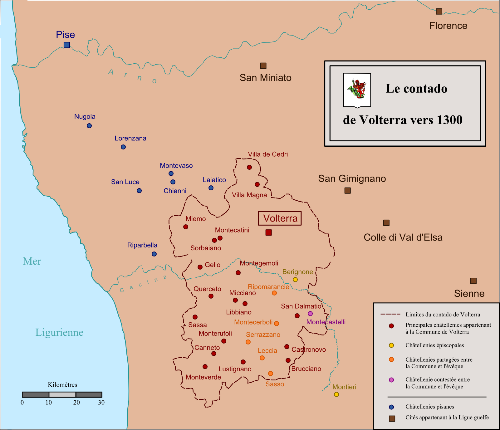 Volterra et les châtellenies de son contado (en rouge) vers 1300. En bleu, Pise et les châtellenies qui en dépendent proches du contado de Volterra. En marron, autres capitales de républiques urbaines.